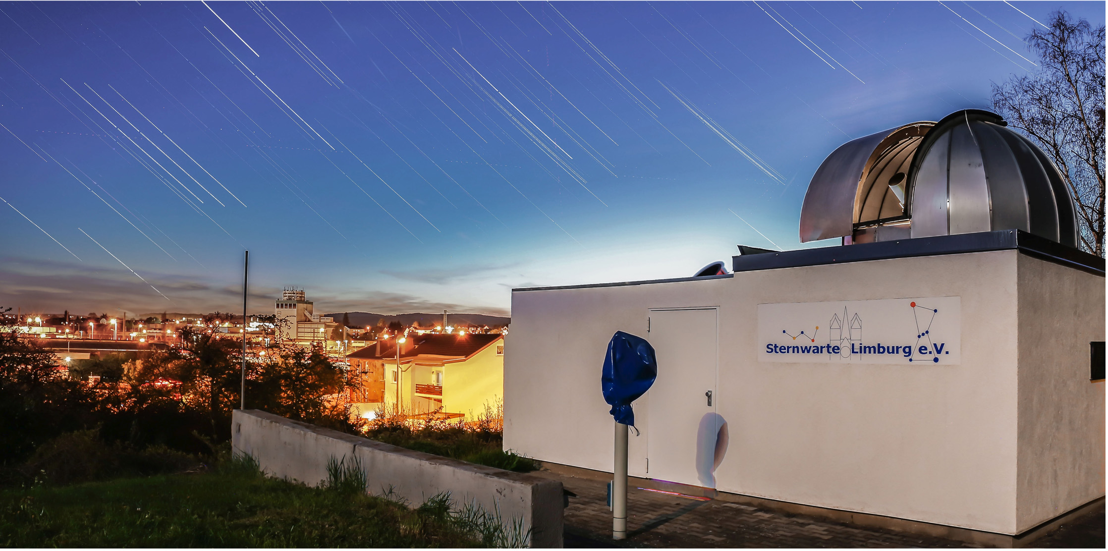 Nachtaufnahme der Sternwarte Limburg